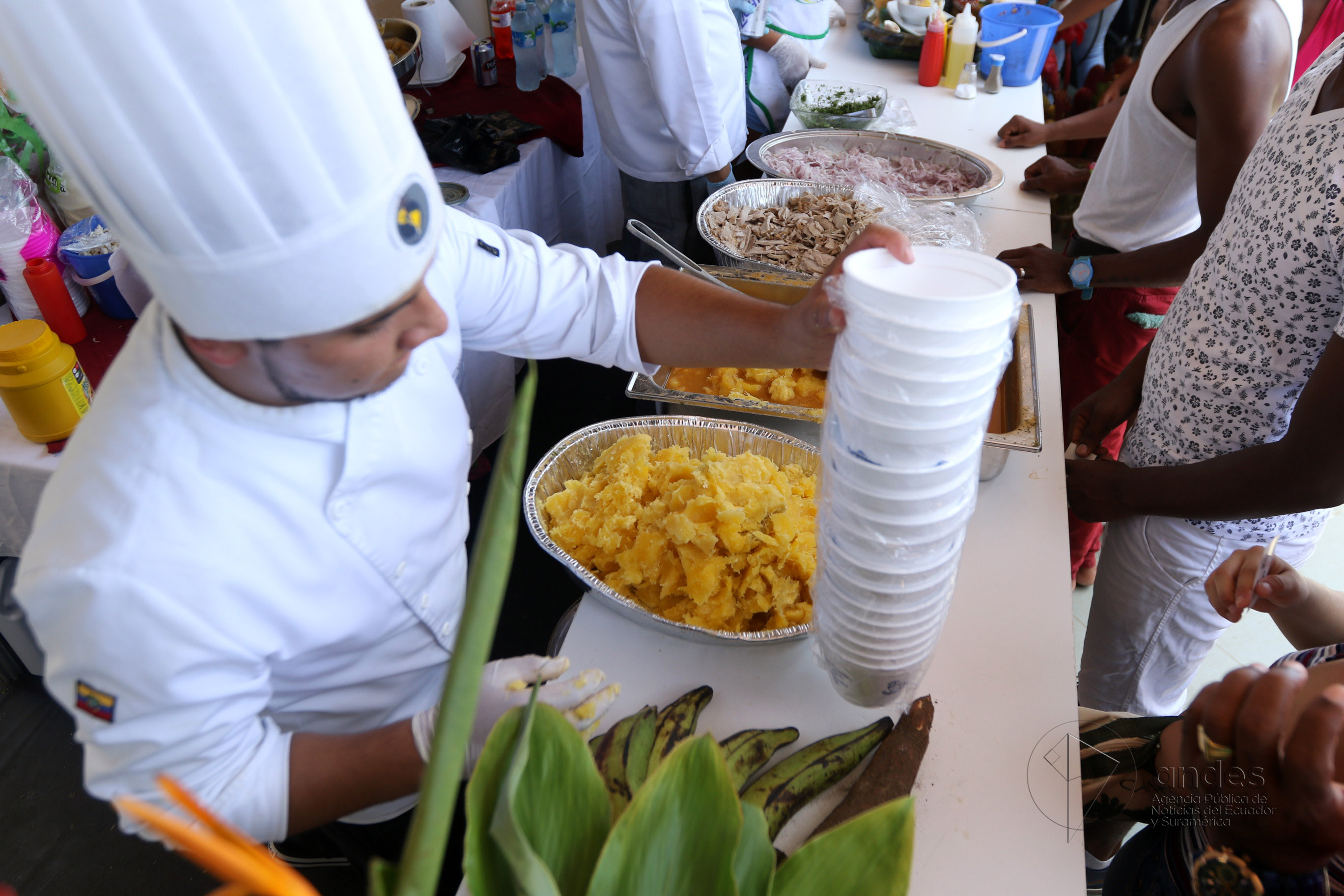 Esmeraldas, Esmeraldas 19 Mar (Andes).-El Mundial del encebollado se celebró en la playa Las Palmas con la presencia del presidente de la República Rafael Correa. Fotografías: Carlos Rodríguez/Andes.